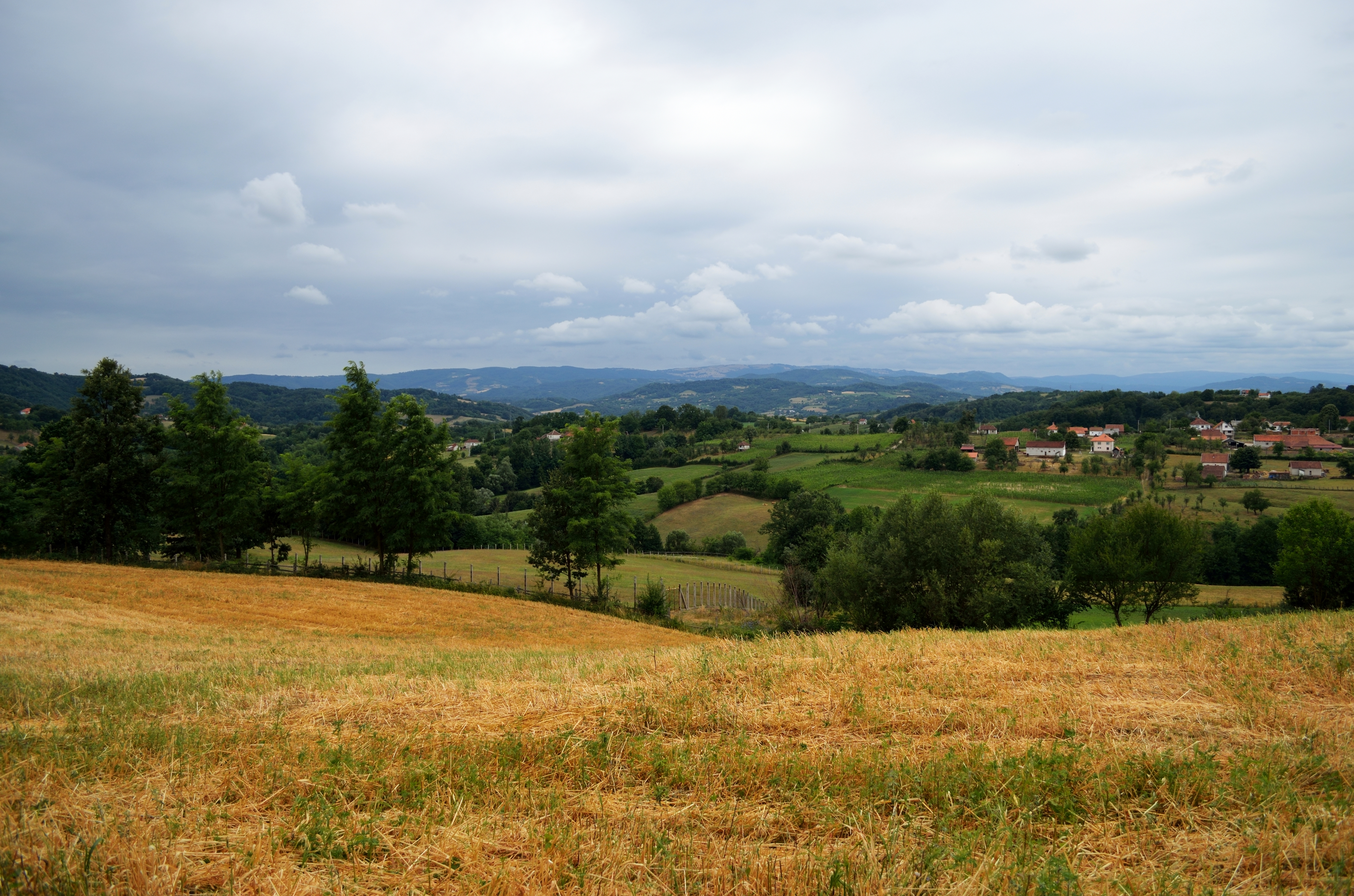 Пољанице